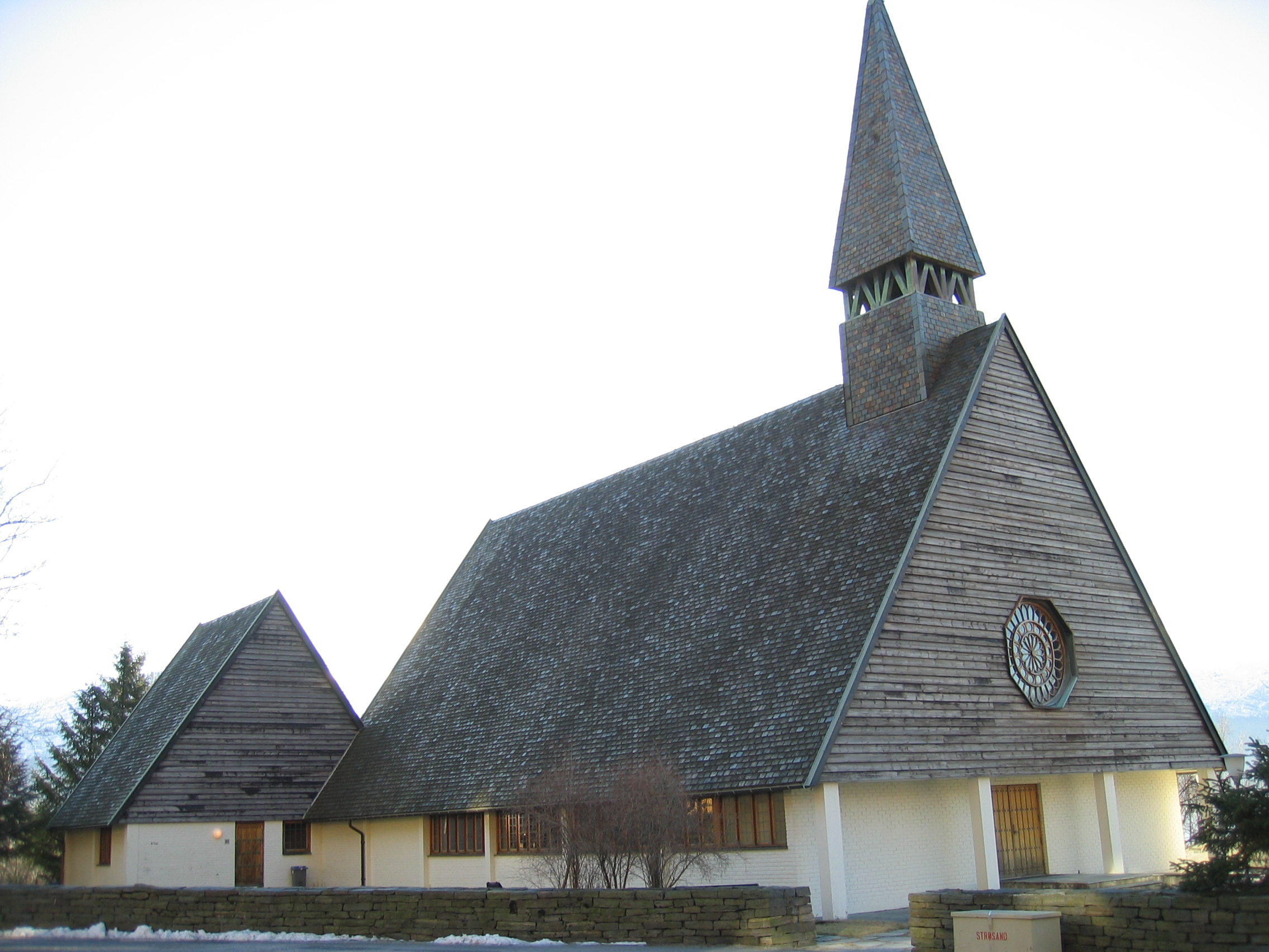 Ålvik kyrkje, Hordaland, Norway.